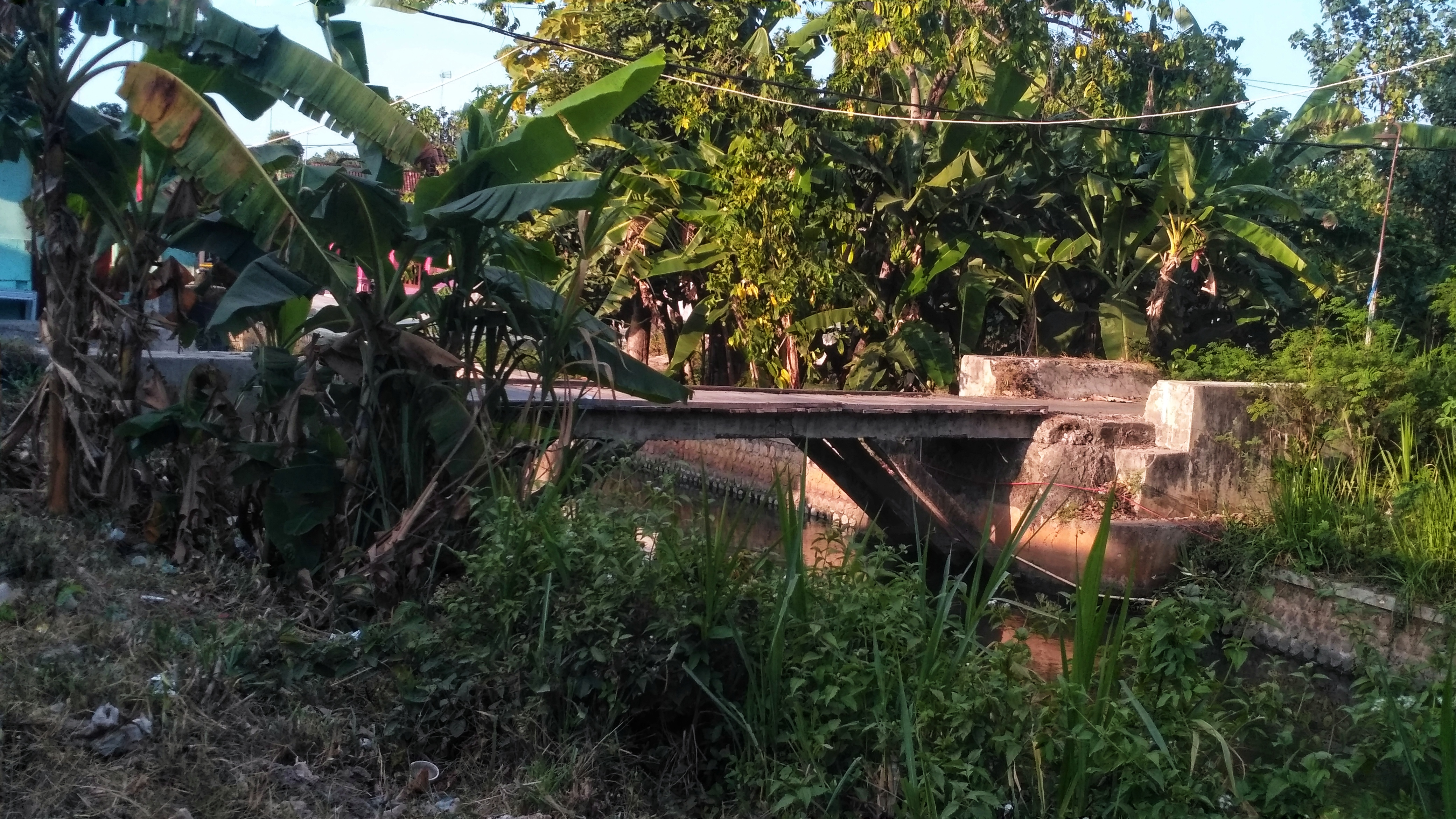 Tampak samping bekas jembatan kereta api di dekat Stasiun Merakurak.